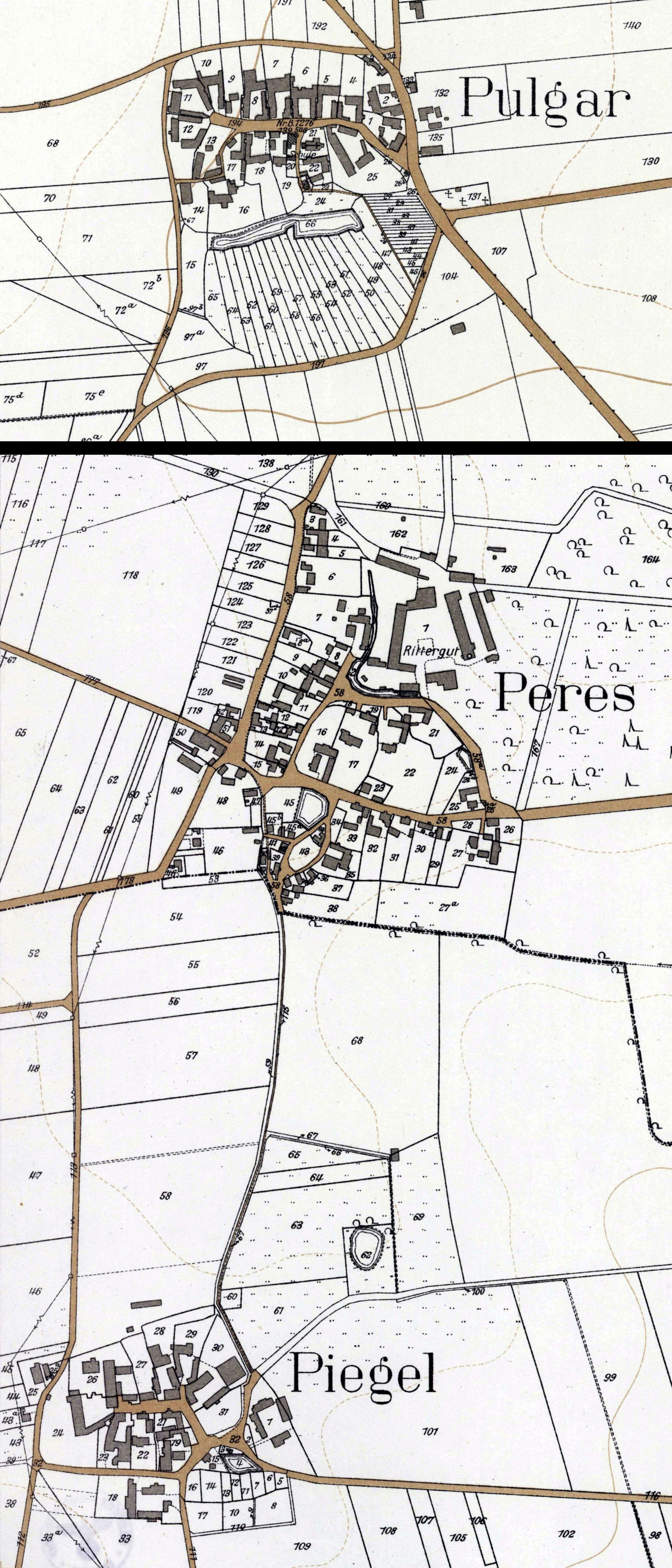 Ausschnitt von Pulgar, Peres und Piegel auf Blatt 42a der Grundkarte Sachsens